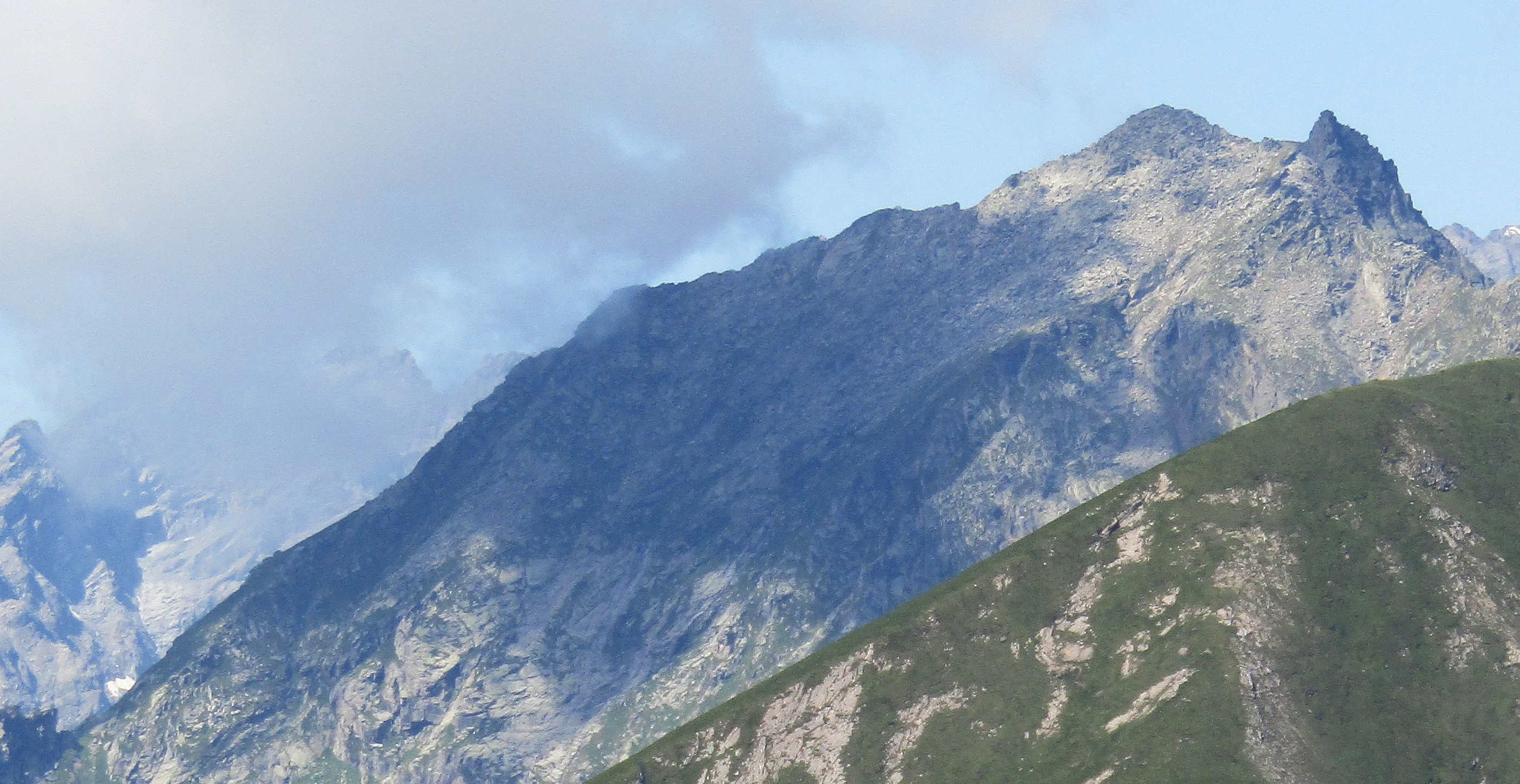 Il Monte Colombo (Alpi Graie) visto dalla Val Soana (pendici del Monte Marzo)